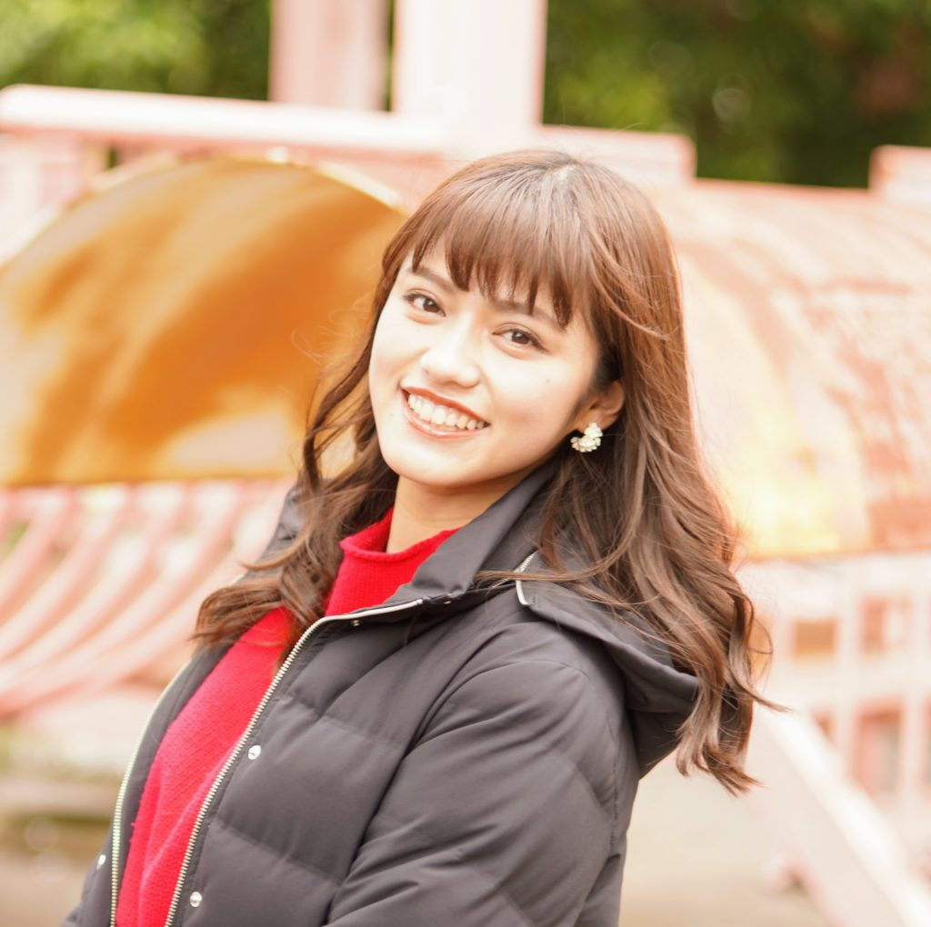 加納永美子さん画像（西宮つーしん、2020,2,25撮影）